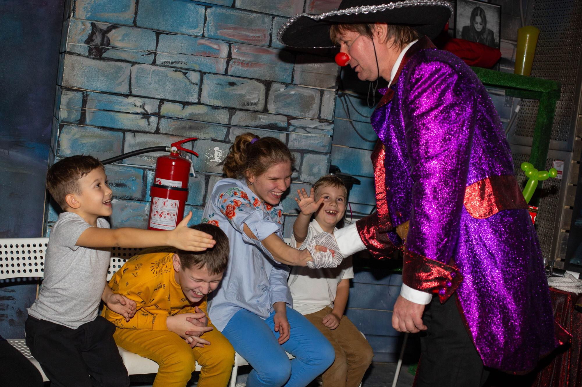 Клоун фокусник на детский праздник с кроликом. Москва и Подмосковье.